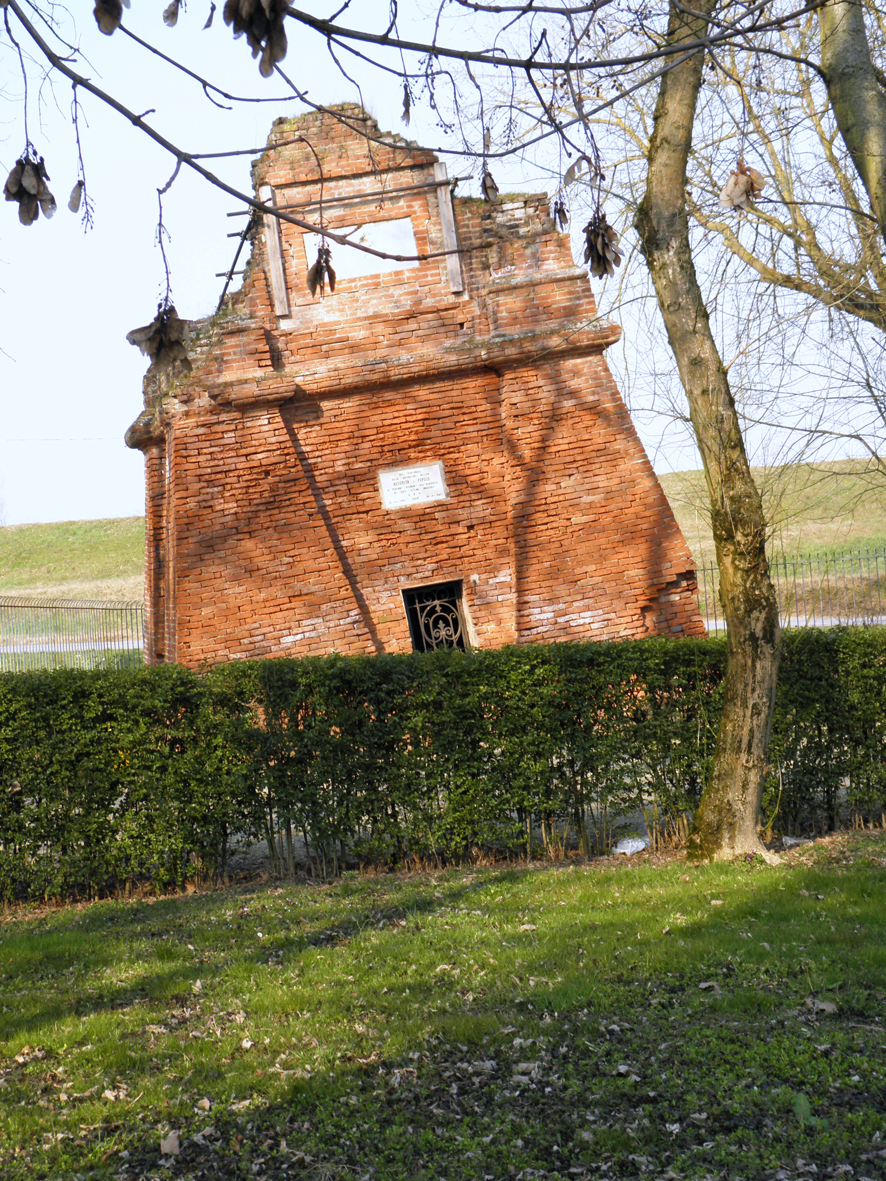 Lusia: la base del campanile in rovina della vecchia parrocchiale dei Santi Vito e Modesto, trasformata in cappella votiva, sita nel parco in Via 25 Aprile. La chiesa fu abbattuta dal bombardamento che subì la cittadina durante la seconda guerra mondiale.